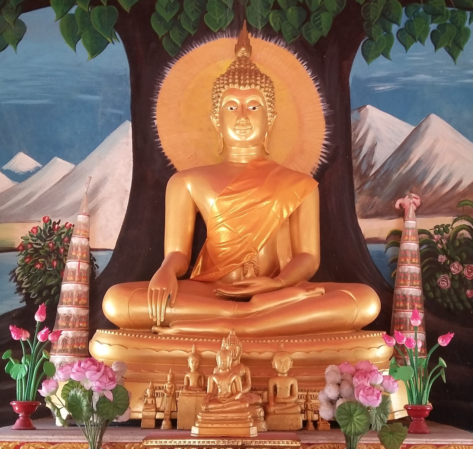 พระประธานภายในพระอุโบสถวัดตรีสุวรรณาราม บ้านซำ อ.มหาชนะชัย จ.ยโสธร